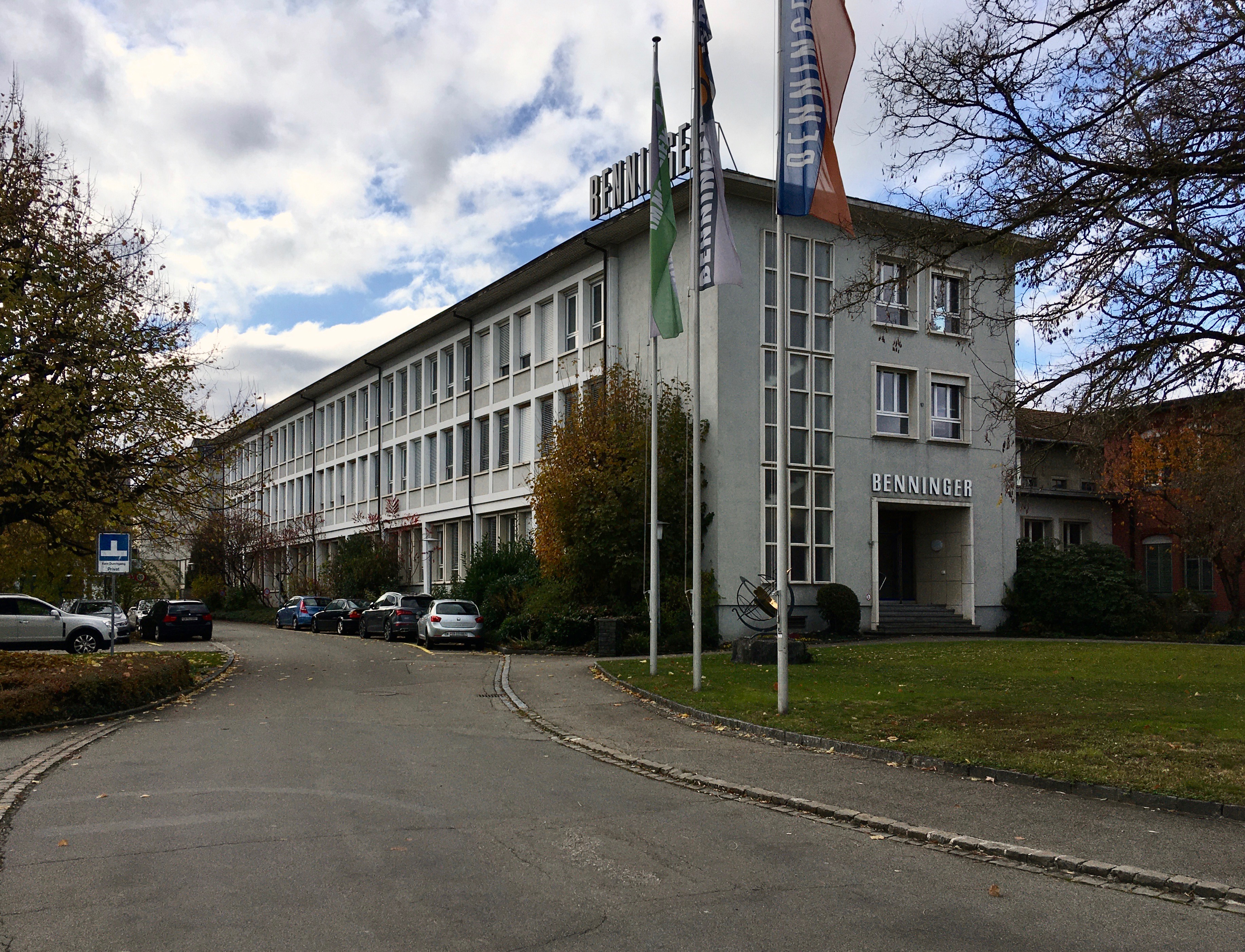 Benninger AG in Uzwil, Hauptgebäude, Eingang